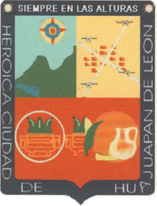 Imagen del escudo de Huajuapan de León, Oaxaca, México